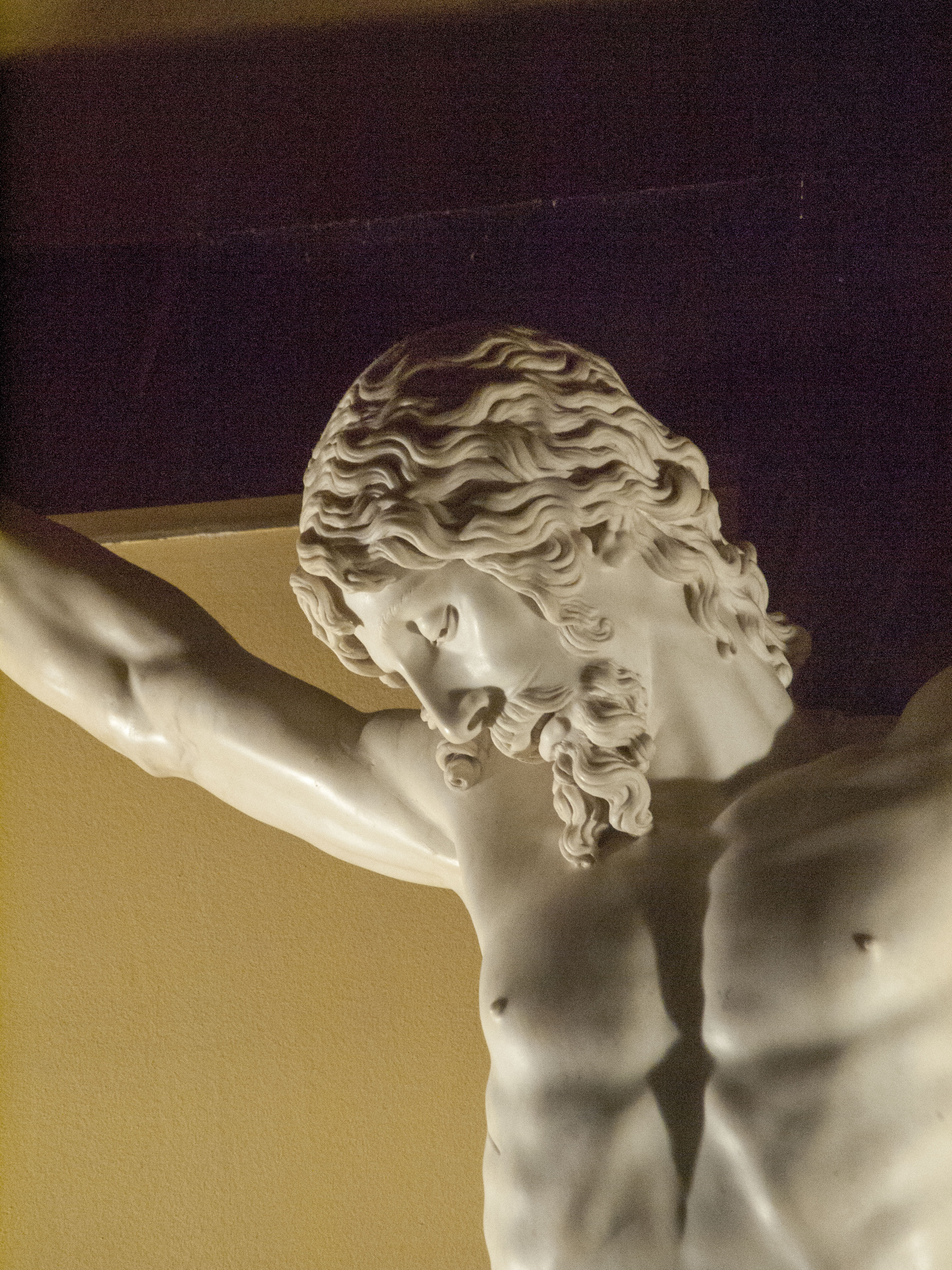 Cellinik bere hilobirako egindako kruxifijoa eta Felipe II eskuetan bukatu zen. Biluzik dagoen Kristo bakarrenetako bat, arastasun ohiala badu ere.